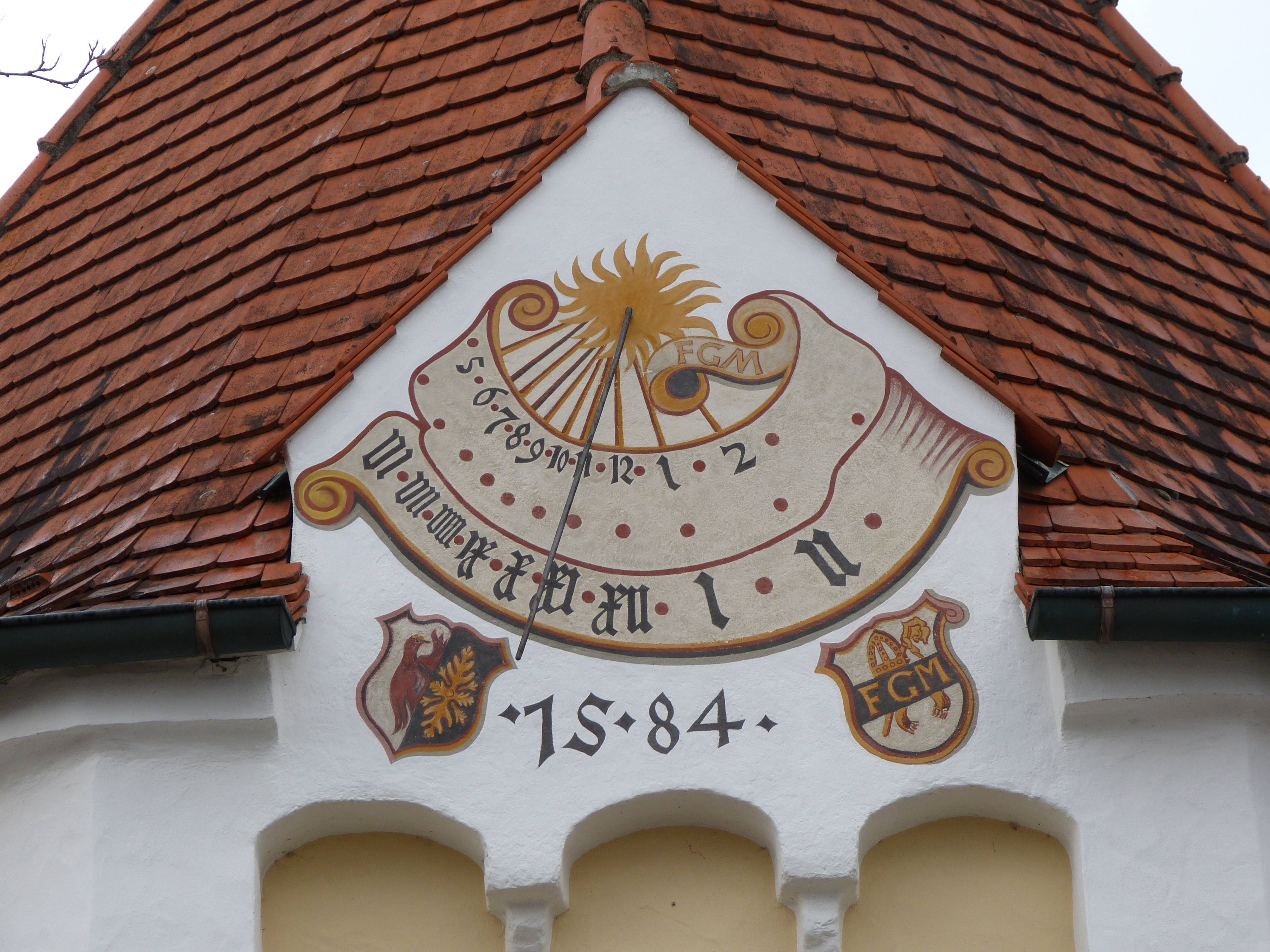 St. Sebastian in Rummeltshausen, Gemeinde Westerhaim, Landkreis Unterallgäu, Bayern